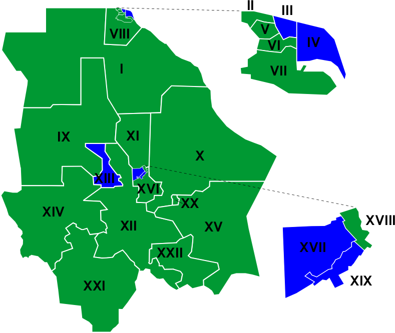 Resultados de la elección a Diputados por partido político en el estado de Chihuahua, México